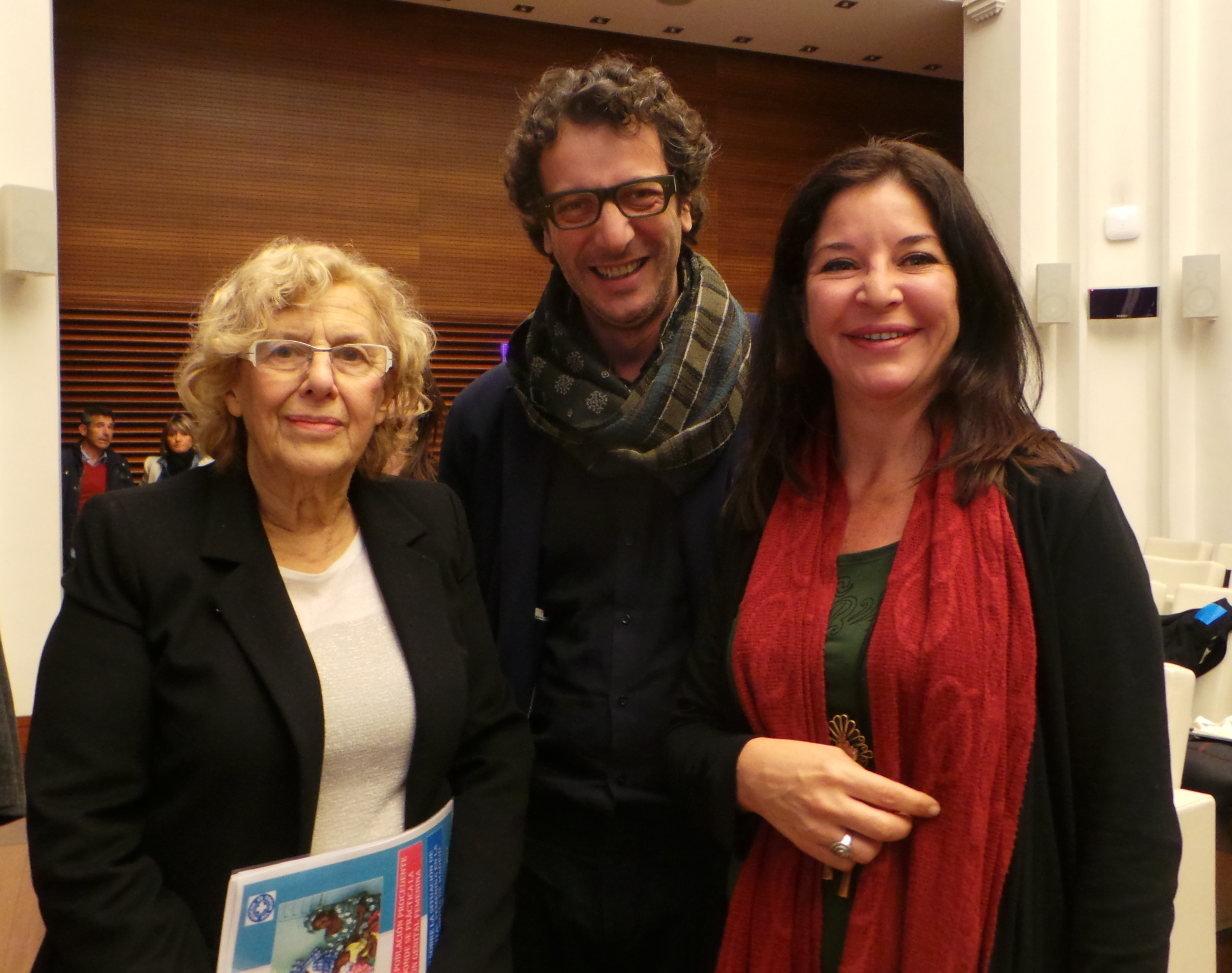 Inauguración de las Jornadas sobre Mutilación Genital Femenina. Programa Académico Multisectorial para prevenir y combatir la Mutilación Genital Femenina (MGF). Madrid 2017